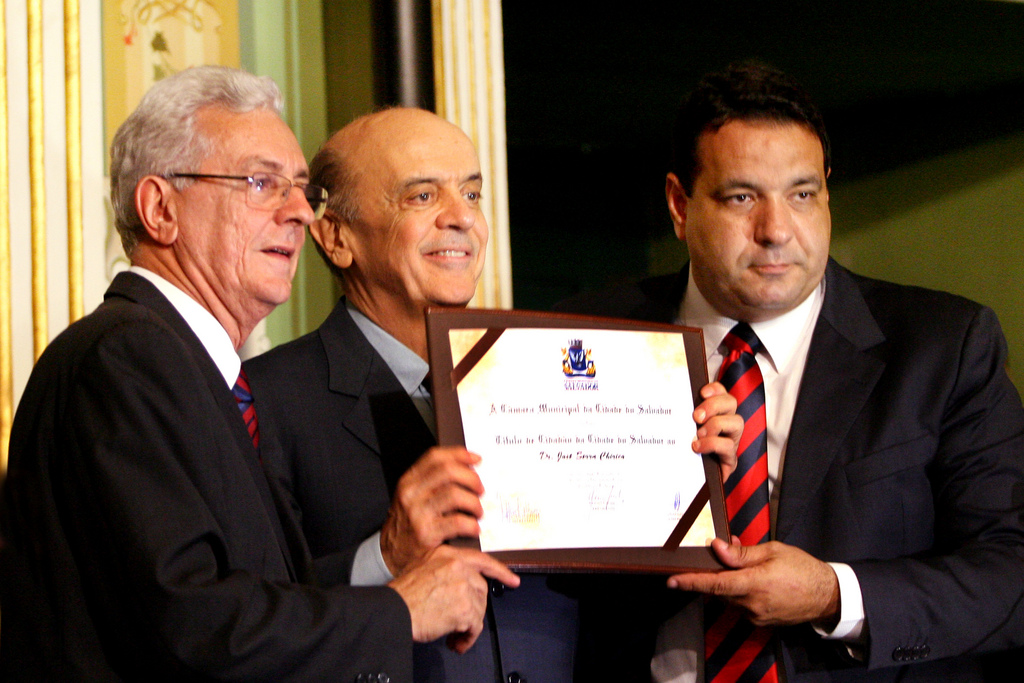 José Serra recebe o titulo de Cidadão de Salvador, na Câmara Municipal, ao lado de Alan Sanches e Jorge Jambeiro. BA, 28 de setembro de 2010.